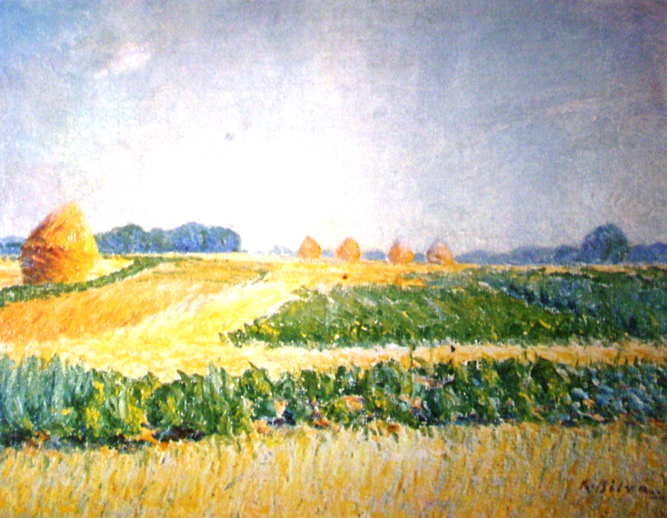 see below